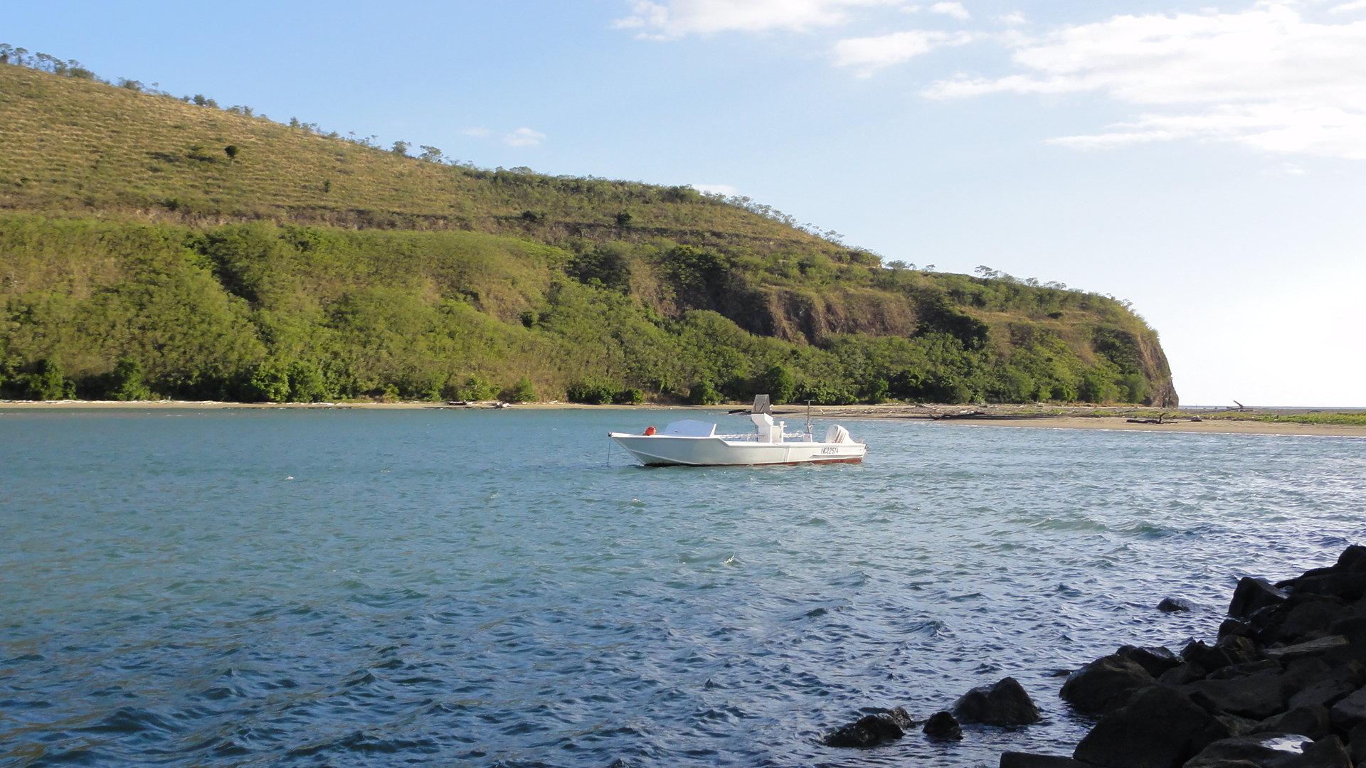 La Néra avec un Bâteau